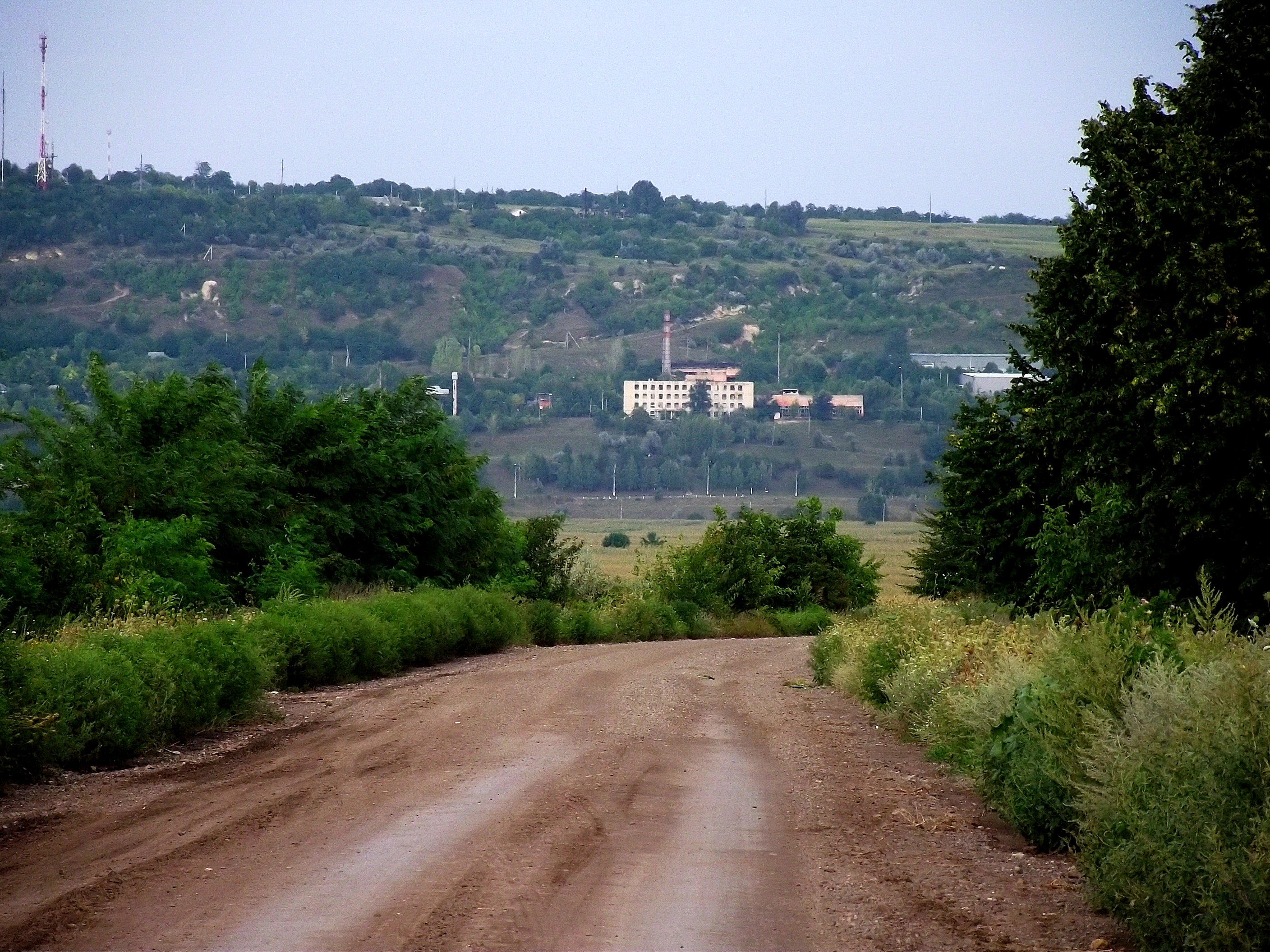 L131, Sănătăuca, Moldova